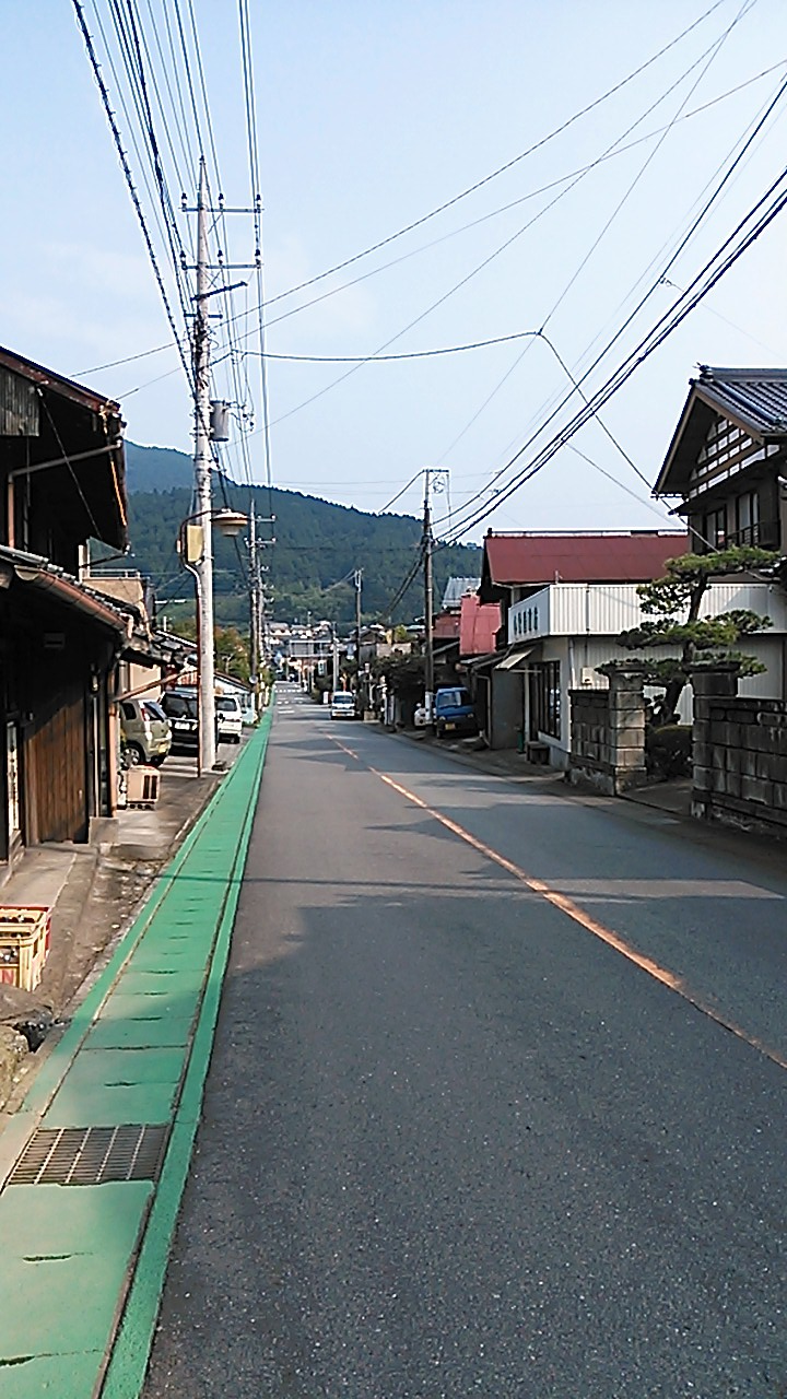 現在(2013年)の万沢宿(2013年8月16日撮影)